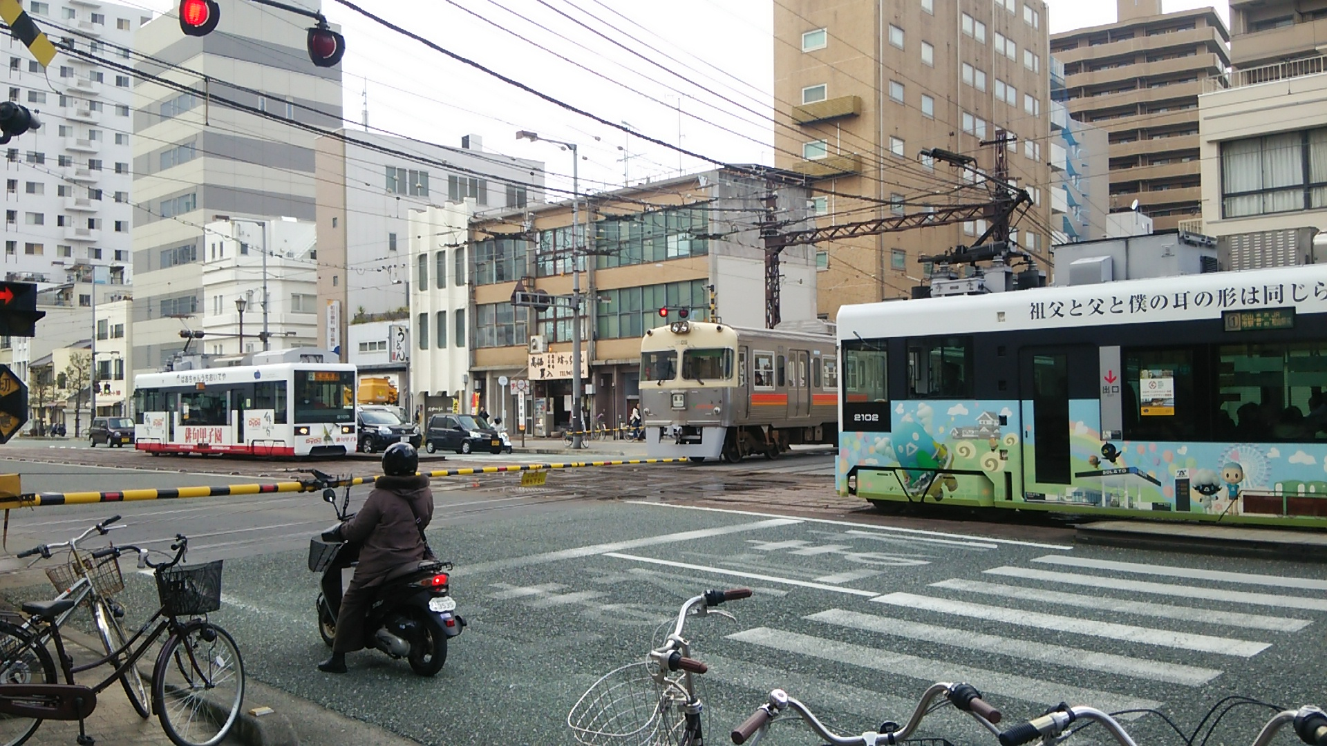 ダイヤモンドクロスの大手町線視点からの画像です。